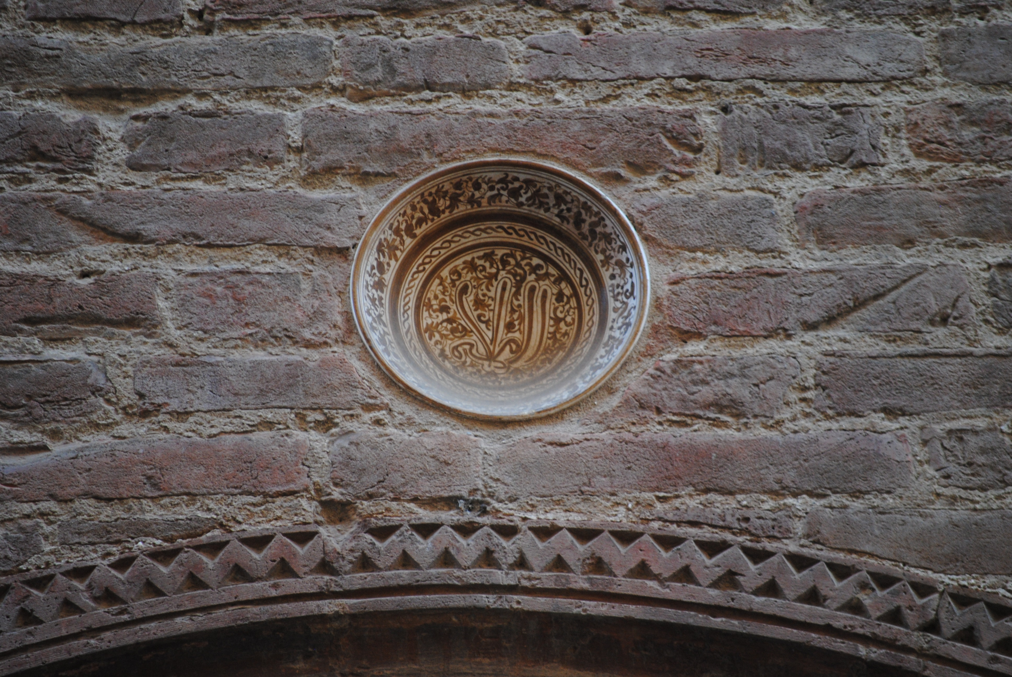 Bacino ceramico posto sul muro esterno che affaccia su via San Francesco della chiesa di Santa Cecilia (pisa). L'originale è conservato presso il Museo nazionale di San Matteo.